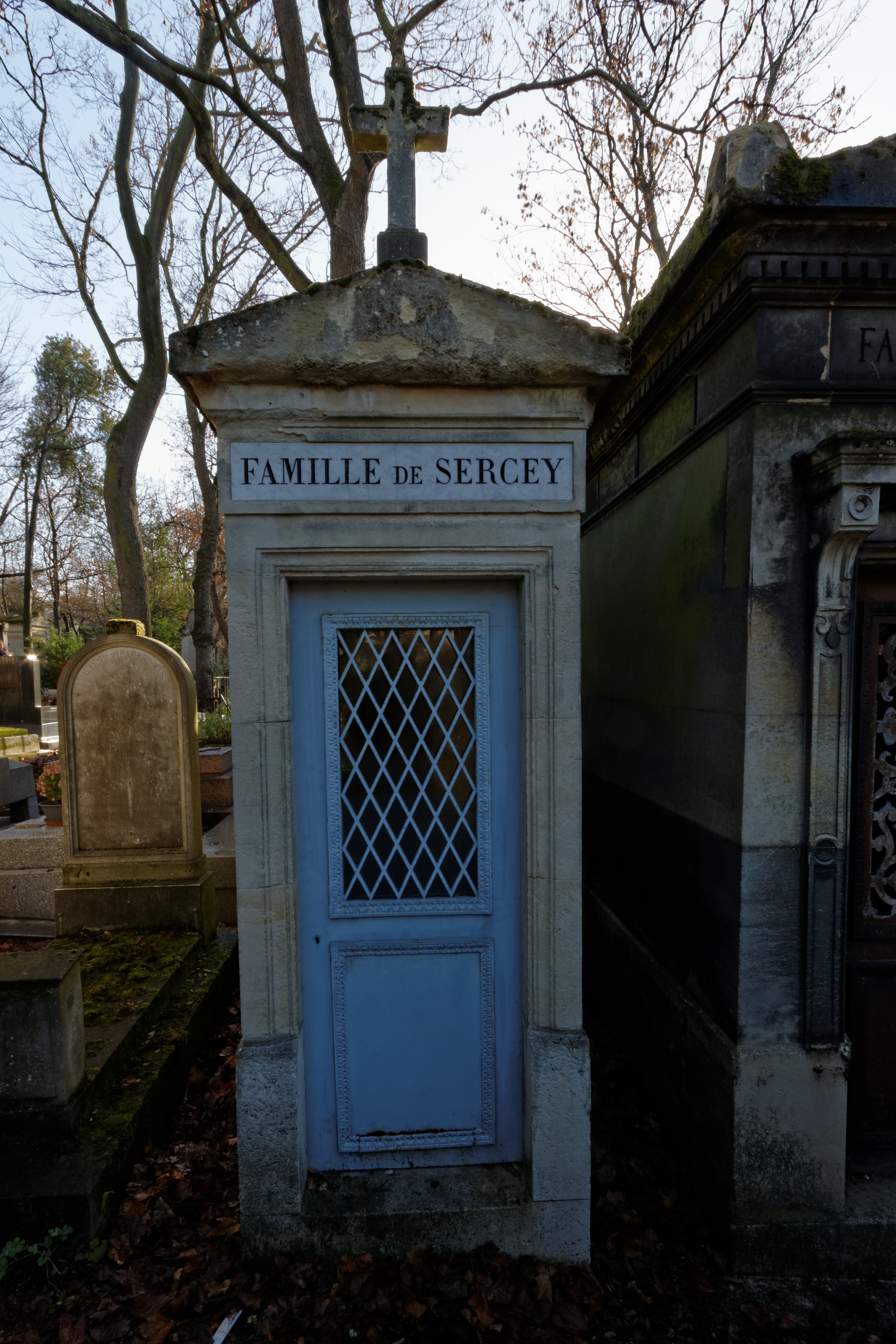 Chapelle de l'officier de marine Pierre-César-Charles-Guillaume Sercey (1753-1836).